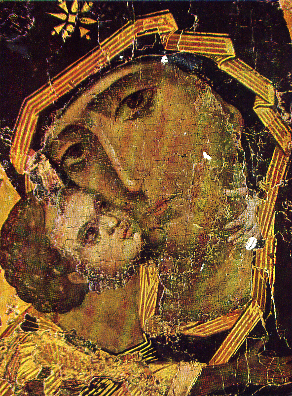 Die Gottesmutter von Wladimir